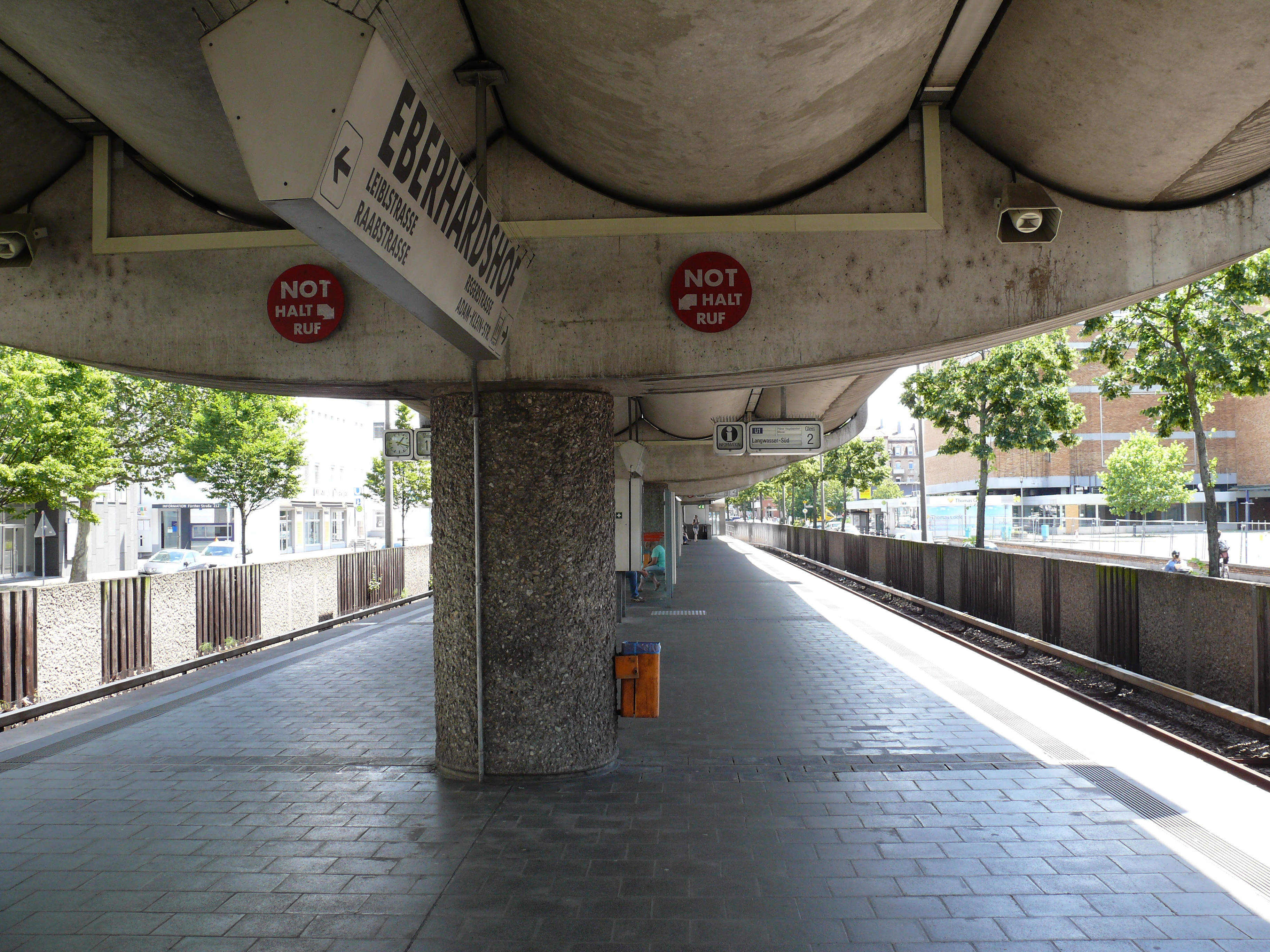 Bahnsteig am U-Bahnhof Eberhardshof in Nürnberg.